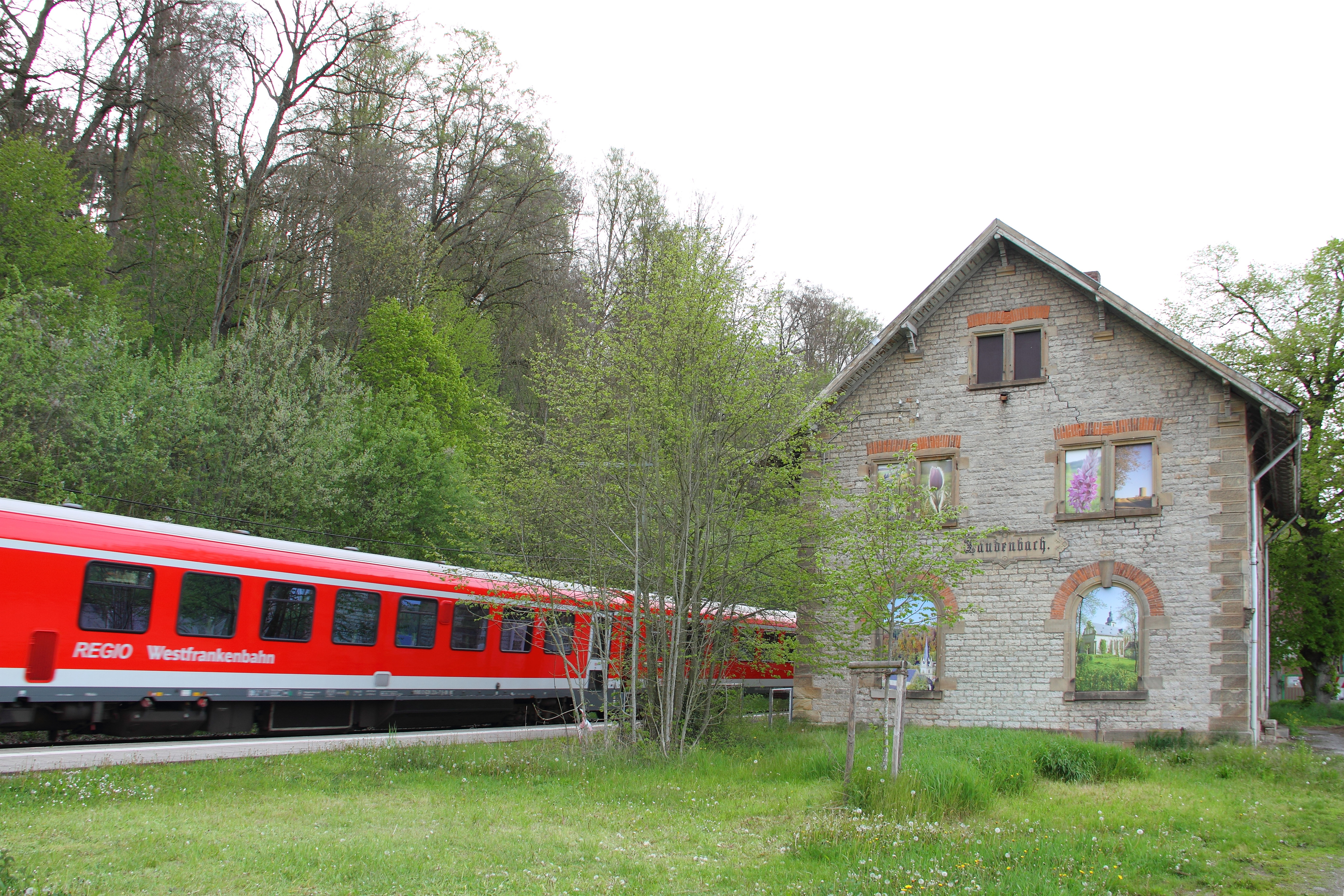 Von den zwei alten Sommerlinden vor dem Bahnhofsgebäude in Laudenbach steht 2017 nur noch eine. Den Platz der zweiten nimmt ein junges Bäumchen ein.